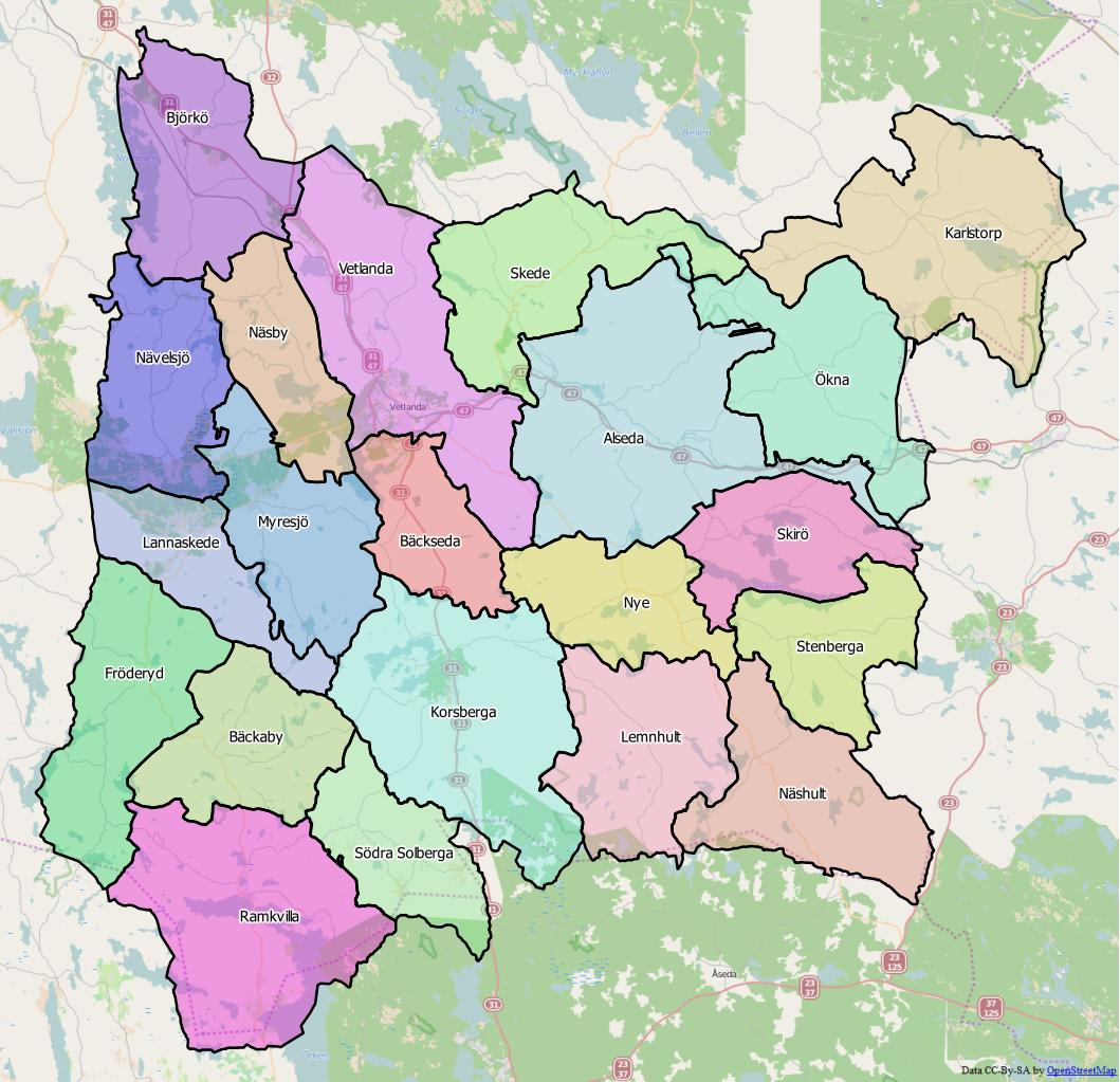 Distriktsindelningen i Vetlanda kommun World file 98.72534731301212219 0 0 -98.72534731301212219 1641424.53003499680198729 7885620.99550416506826878